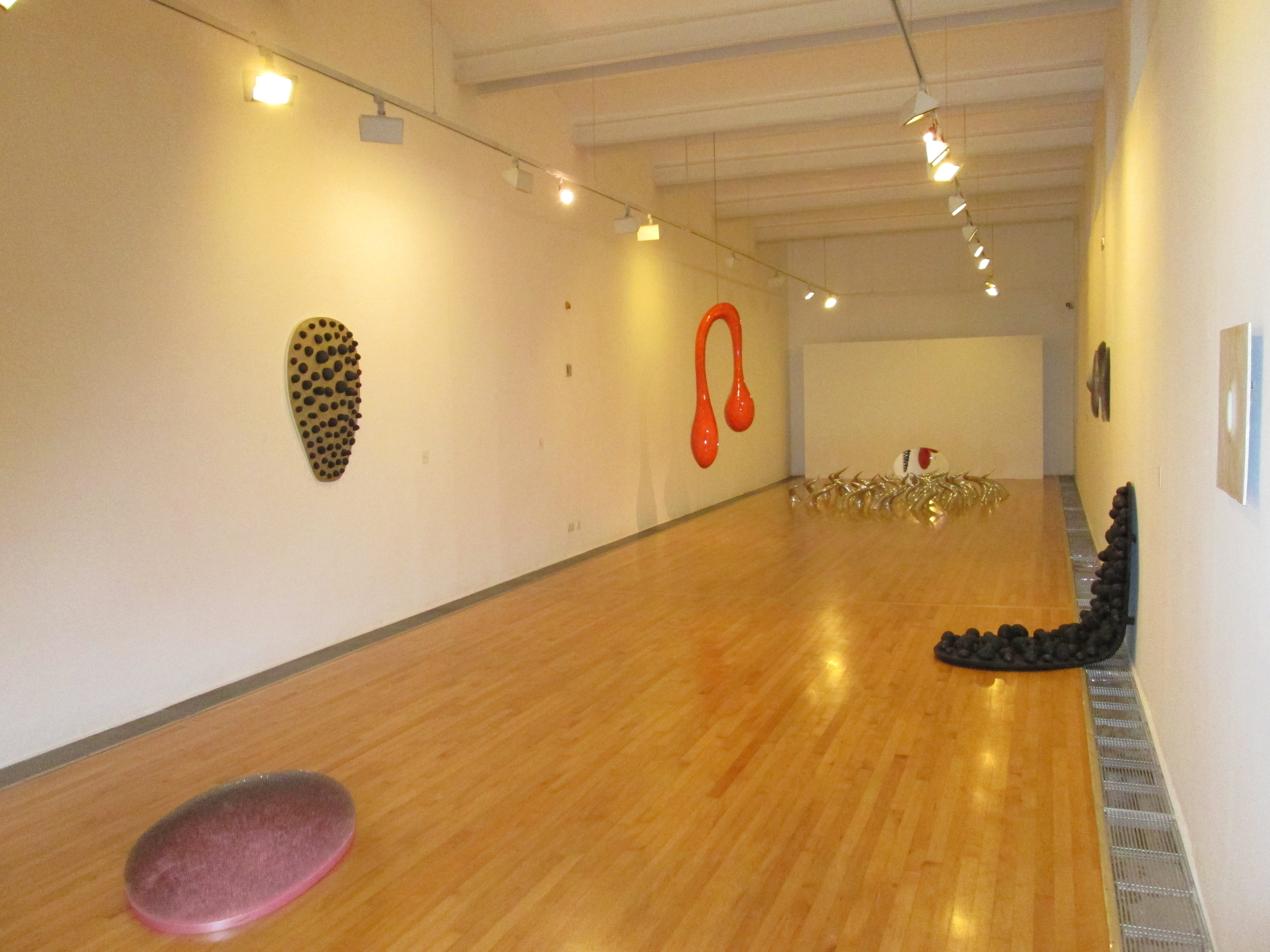 Exposición "Manual de resistencia y acción. La escultura de Antoni Marquès" (del 6 de febrero al 27 de abril de 2014). Museo de Arte de Sabadell, calle del doctor Puig, 16, Sabadell, Barcelona (España).